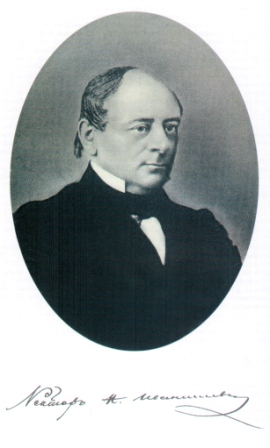 Николай Дмитриевич Иванишев (1811-1874) - правовед и историк права, доктор русского законоведения (с 1840), заслуженный ординарный профессор (с 1864), декан юридического факультета (1849 - 1861), ректор (1862 - 1865) и почетный член (с 1869) Императорского Киевского университета Св. Владимира